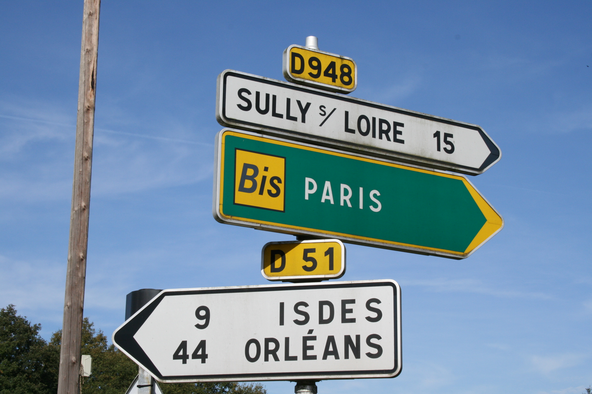 Panneaux directionnels de position D21a (France)